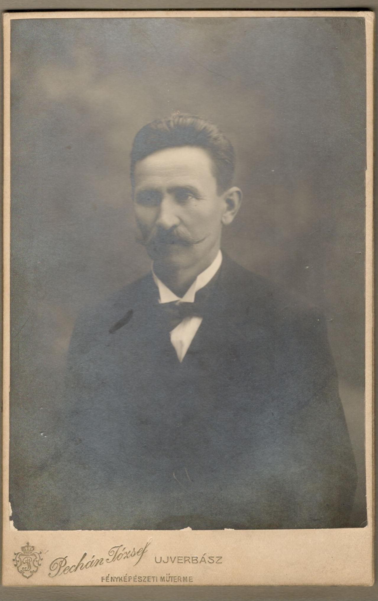 Mileta Leskovac